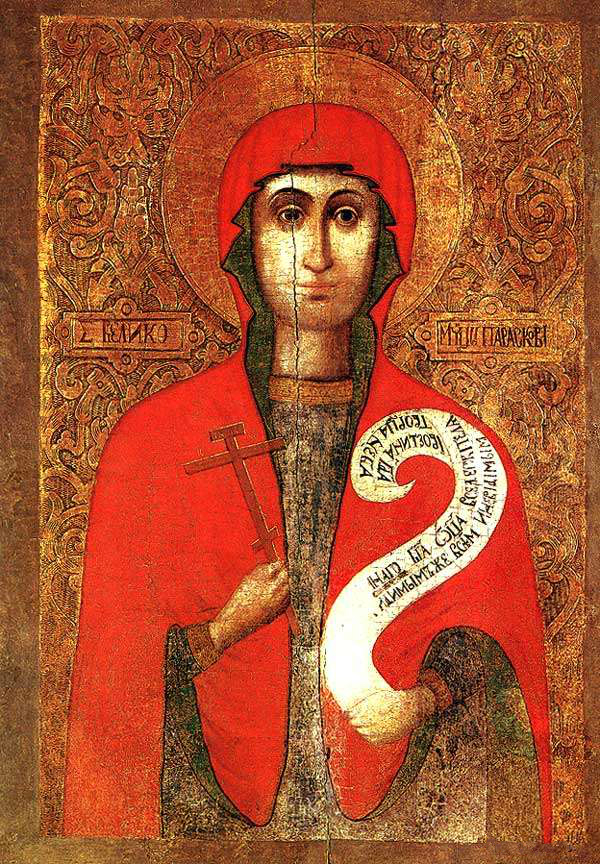 Св.Параскева. Сярэдзіна - другая палова 16 ст. Дошка, яечная тэмпера. 117х81х2,5.